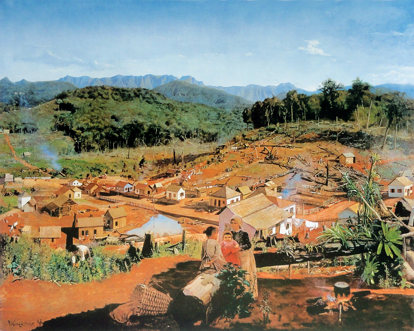 Vida nova (Nova Veneza), óleo sobre tela, 120 x 160 cm, acervo da prefeitura de Nova Veneza